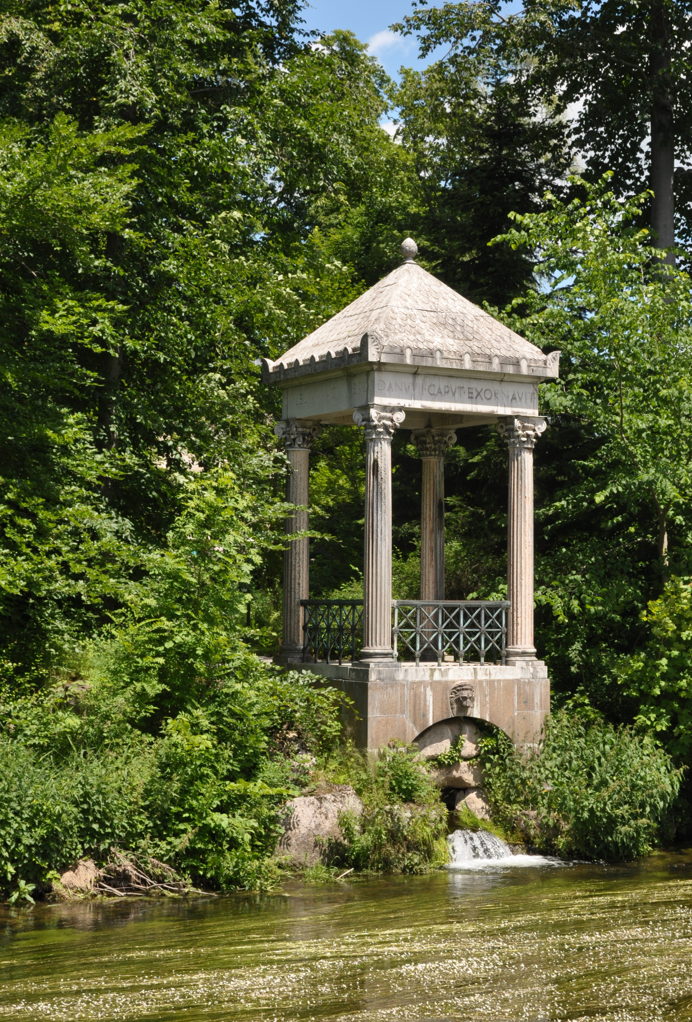 Donautempel in Donaueschingen, Quellzufluss der Donauquelle in die Brigach